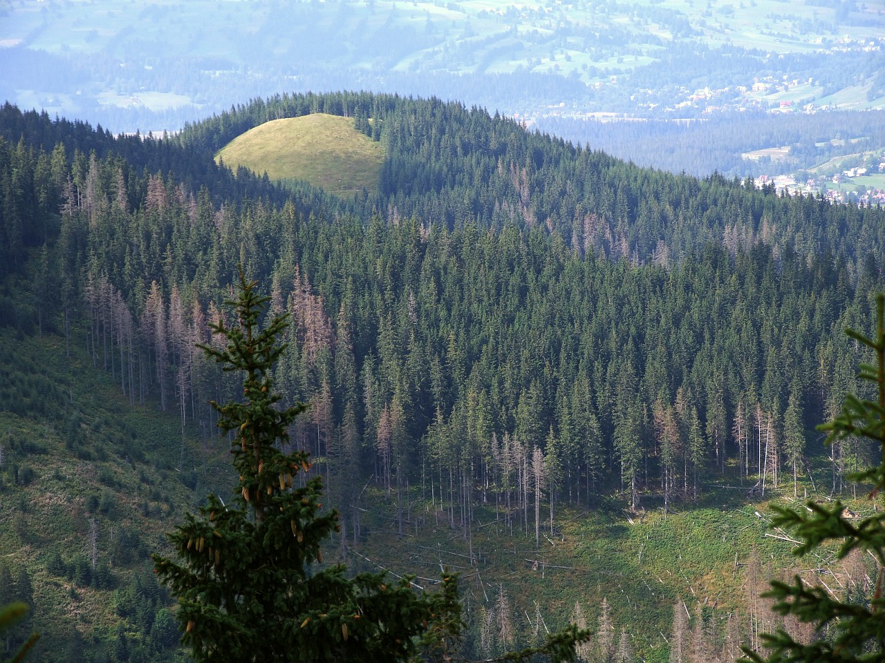 Przednia Kopa Sołtysia, widok z Gęsiej Szyi